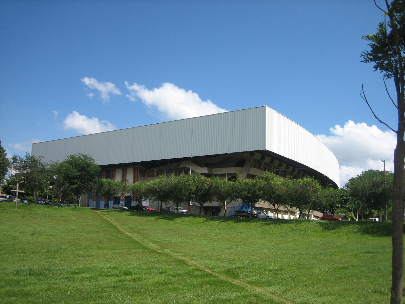 Ginásio Multidisciplinar da Unicamp.